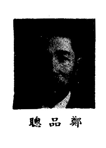 中文（中国大陆）: 制憲國民大會代表